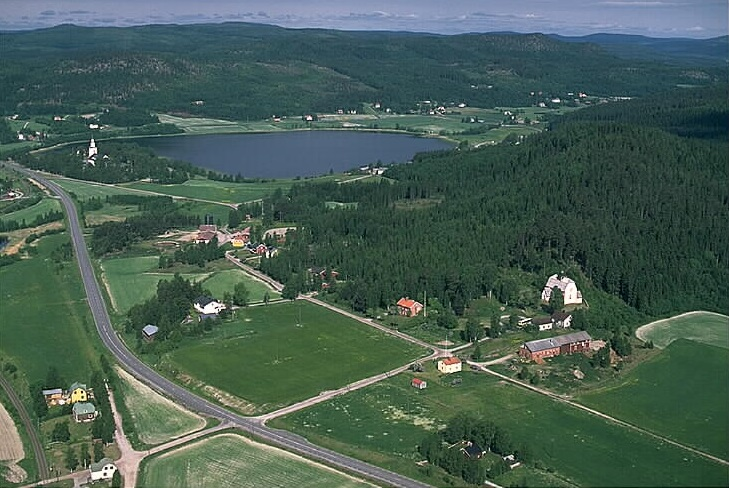 Ytterlännäs gamla och nya kyrka Motiv: Ytterlännäs gamla kyrka Nyckelord: Flygbilder, Riksintressen Kategori: Kyrkby Ytterlännäs gamla och nya kyrka.